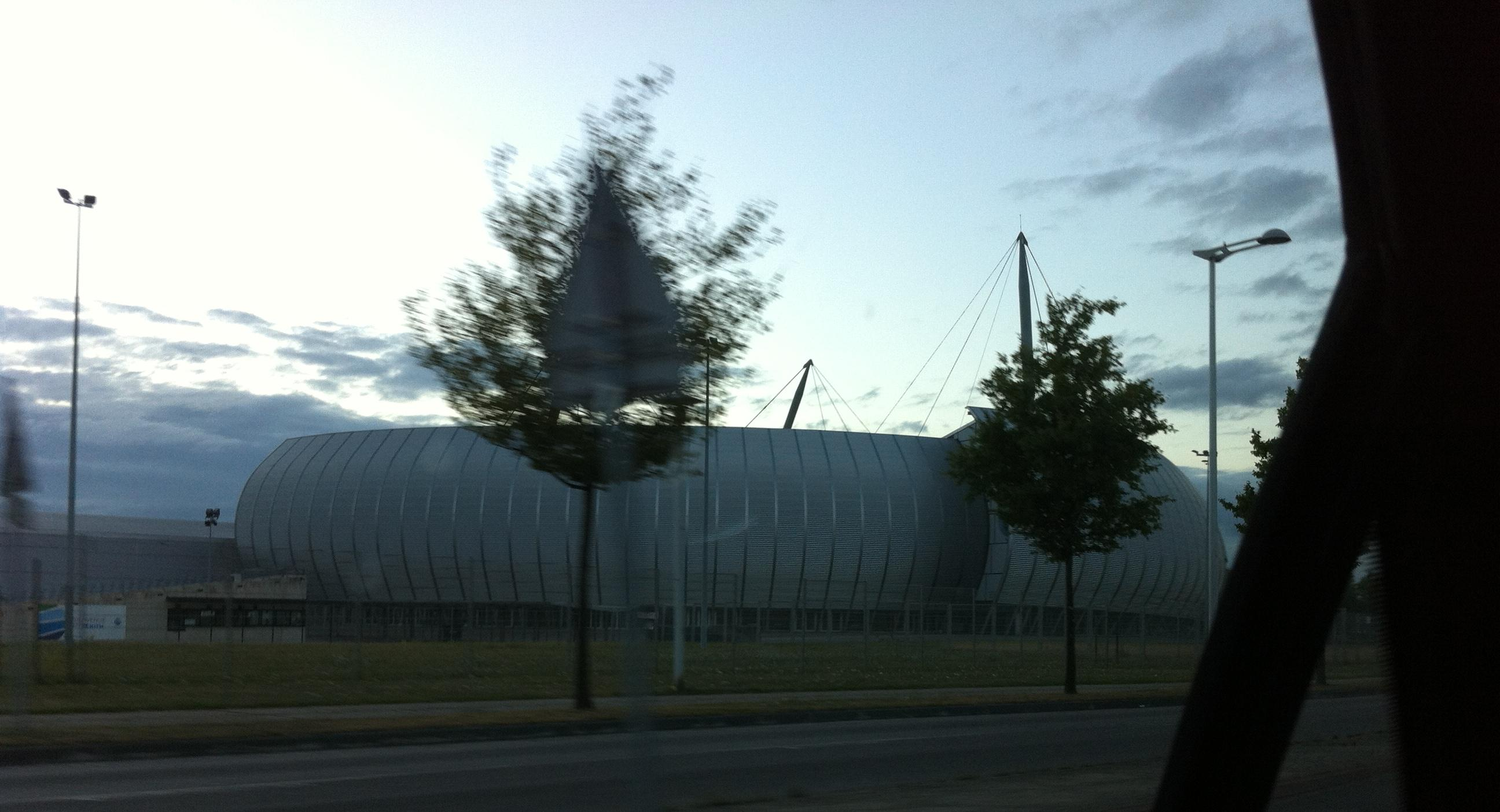 Zénith de Rouen Métropole Normandie à Grand-Quevilly.